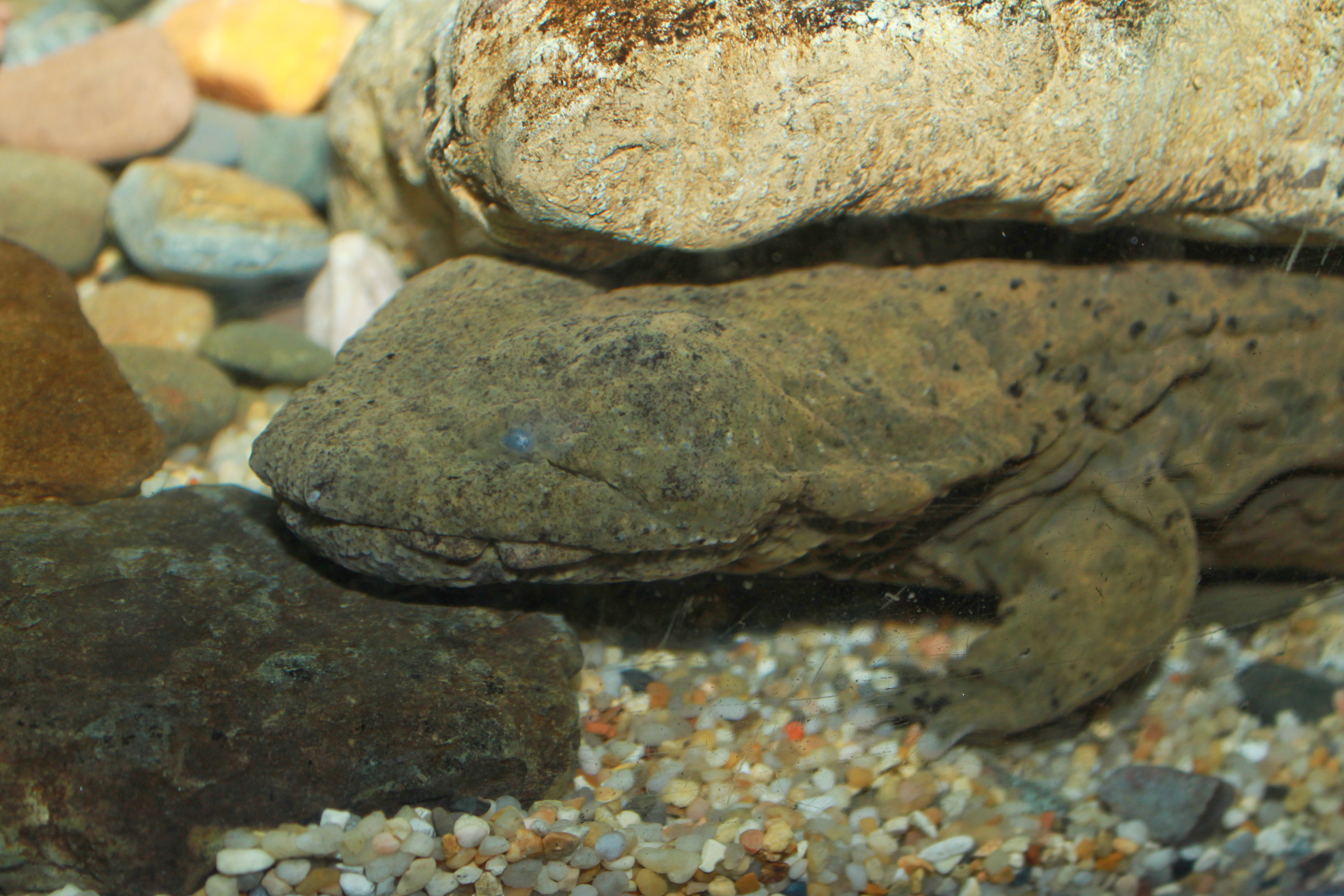 Hellbender Cryptobranchus alleganiensis